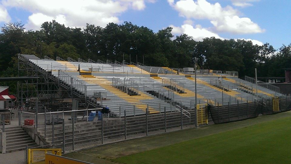 Ausbau der Scholz Arena Osttribüne. Zustand am 25.06.2014